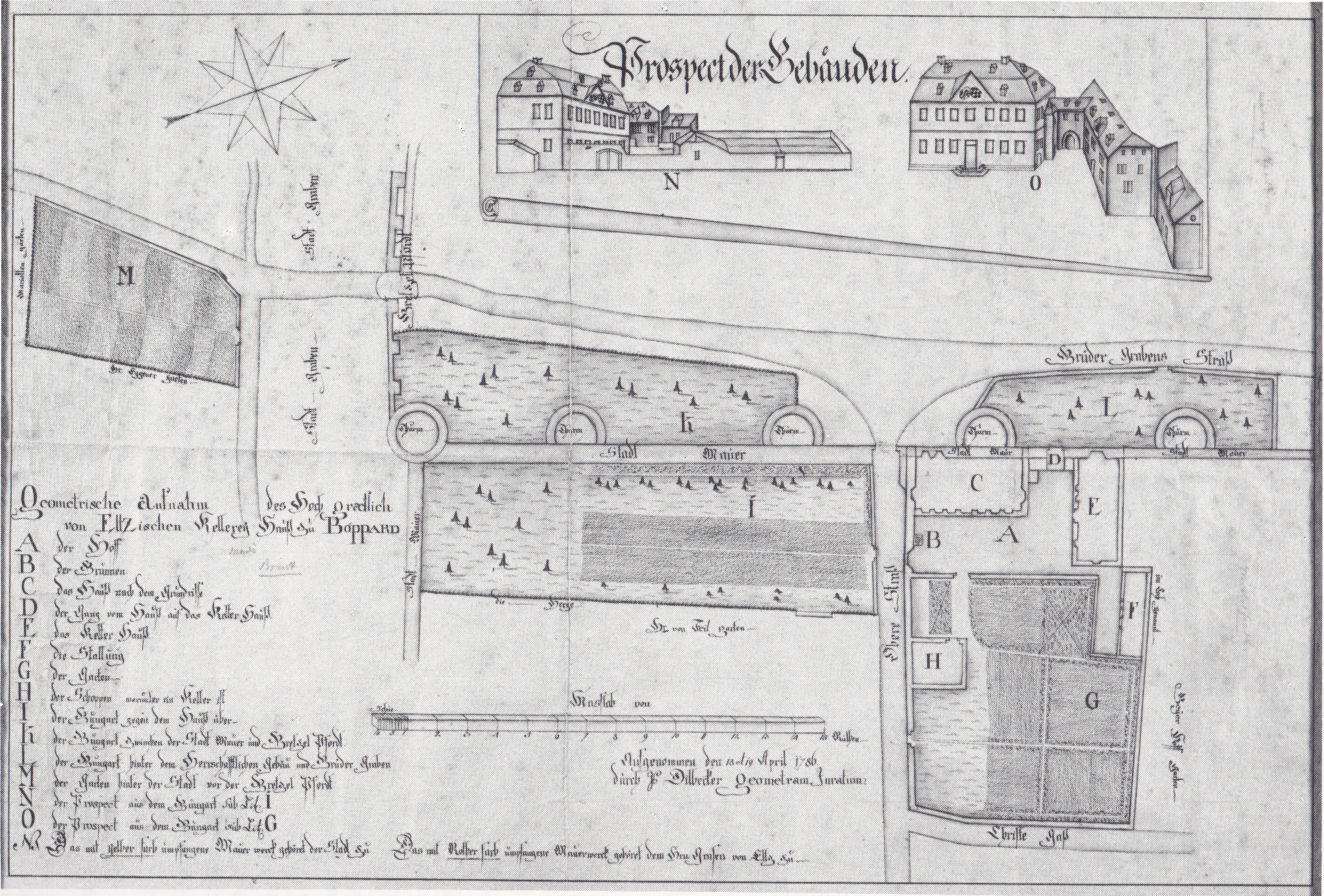 Lagenplan des Eltzer Hofs von Boppard mit der römischen Kastellmauer. Legende aus dem Bild (verkürzt): A Der Hof B Der Brunnen C Das Haus D Der Gang vom Haus auf das Kelterhaus E Das Kelterhaus F Die Stallung G Der Garten H Der Schuppen I Der Weinberg K Der Weinberg L Der Weinberg M Der Garten N Ansicht aus dem Weinberg I O Ansicht aus dem Garten G